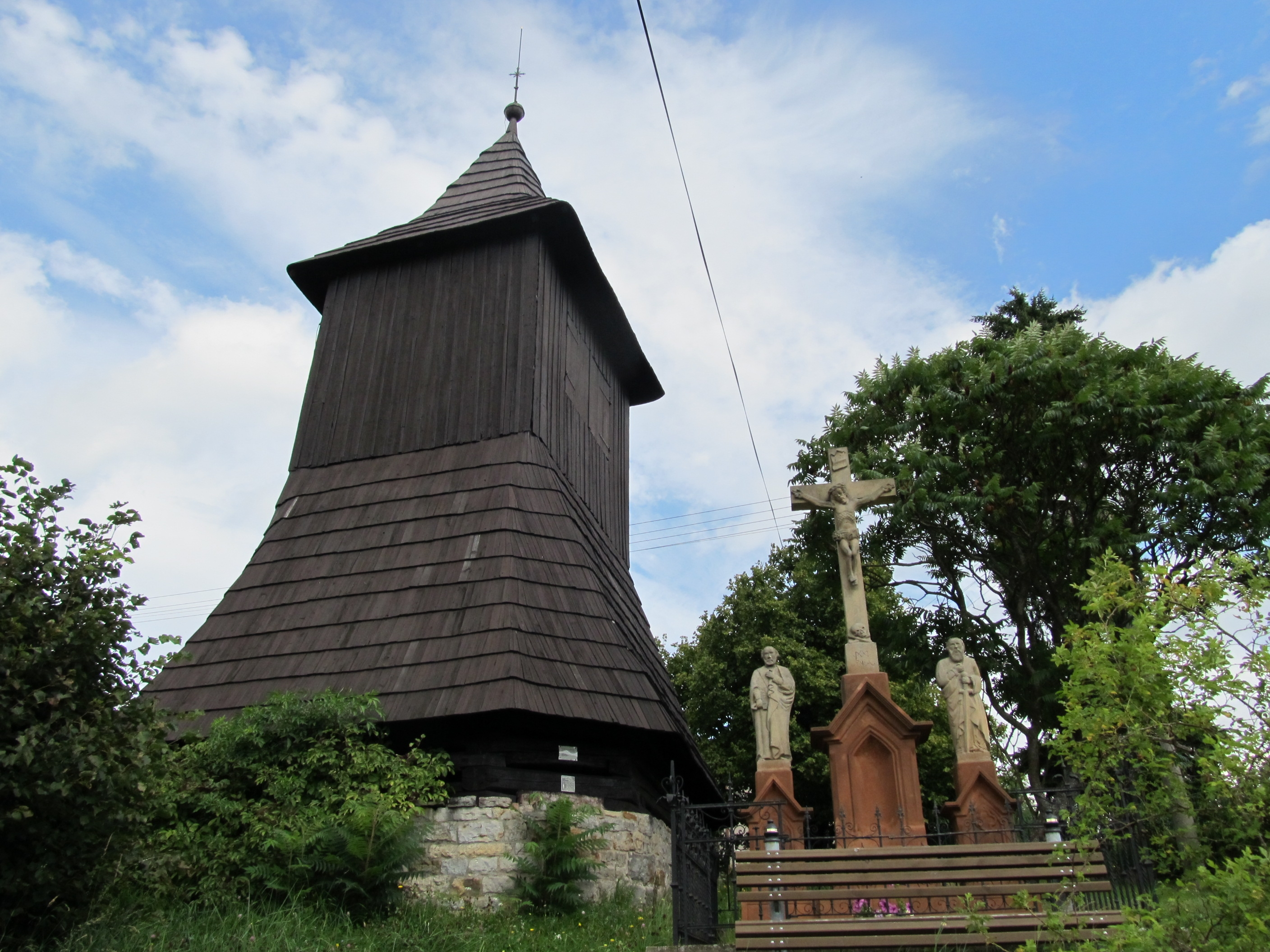 Zvonice a krucifix (Slatina nad Úpou)